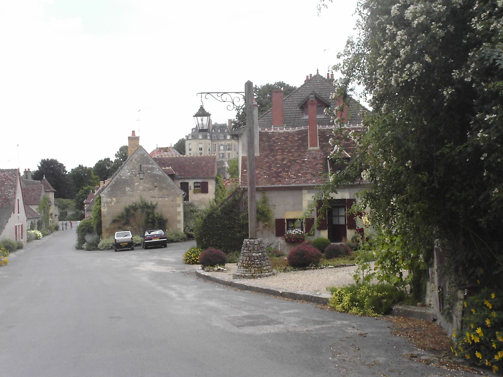 Apremont-sur-Allier est une commune française, située dans le département du Cher et la région Centre. Auteur : Greudin, 2005 Licence